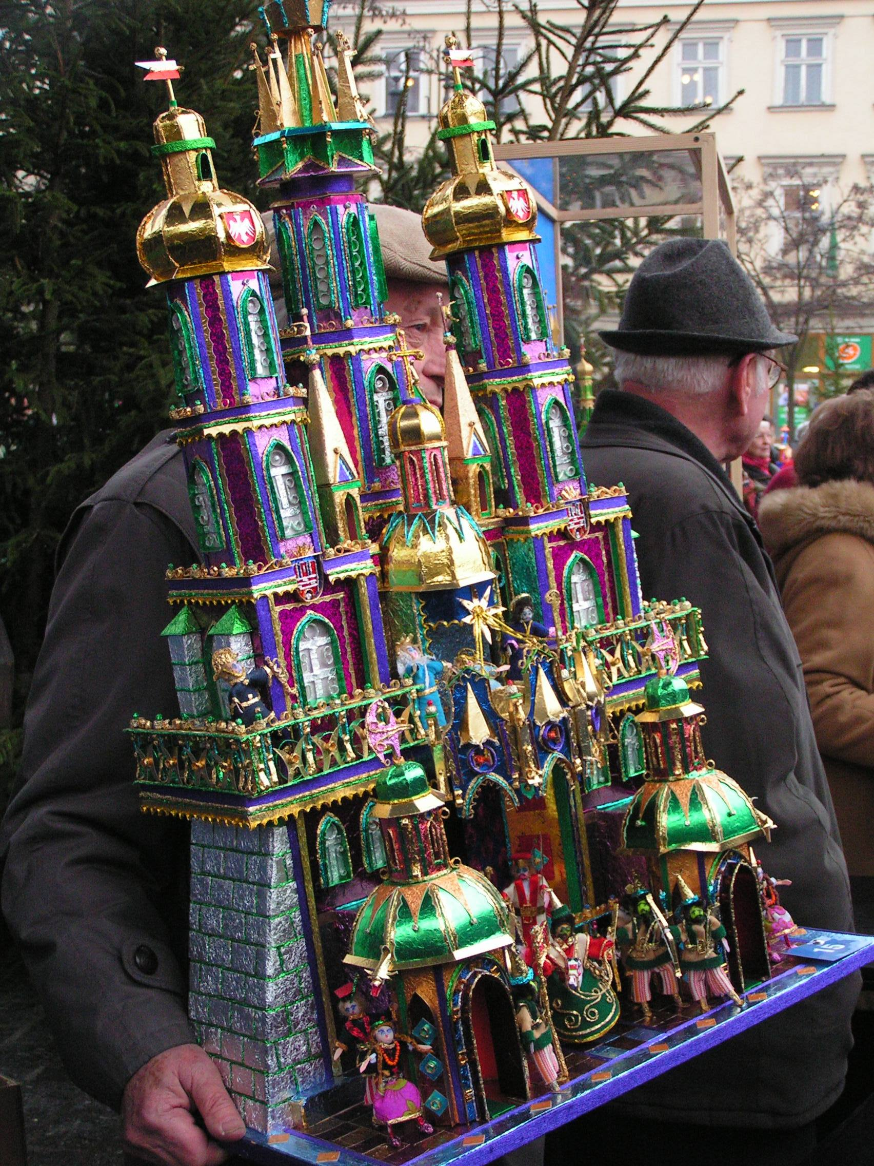 Szopka krakowska podczas konkursu na najpiękniejszą szopkę na rynku w Krakowie